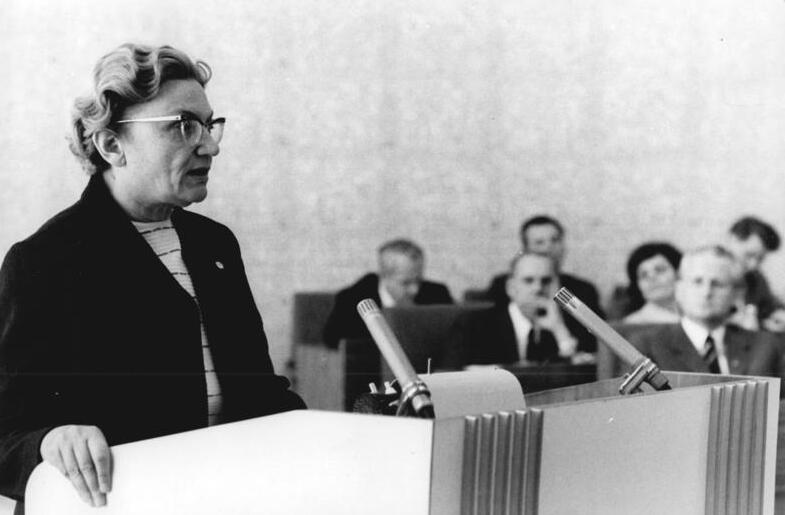 Zentralbild Koard 19.6.1970 Berlin: 25. Staatsratstagung. Auf seiner 25. Sitzung beriet der Staatsrat der DDR am 19.6.70 in Berlin Grundsatzdokumente zur Aus- und Weiterbildung und zur Berufsausbildung. In der Diskussion spach auch das Mitglied des Staatsrates der DDR. Prof. Dr. Lieselott Herforth.